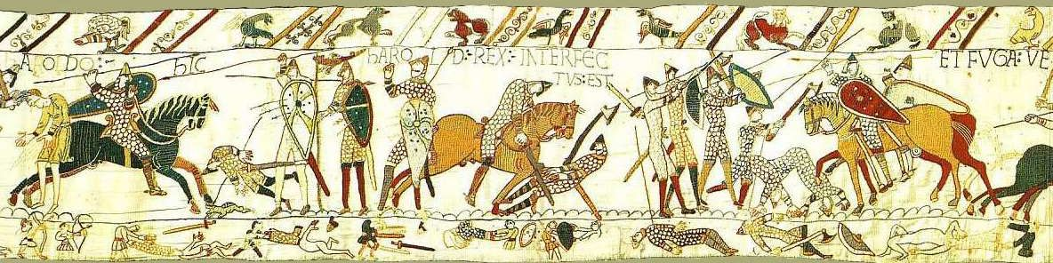 Harald angol király elesik a hastingsi csatában (jelenet a bayeux-i falikárpitról)